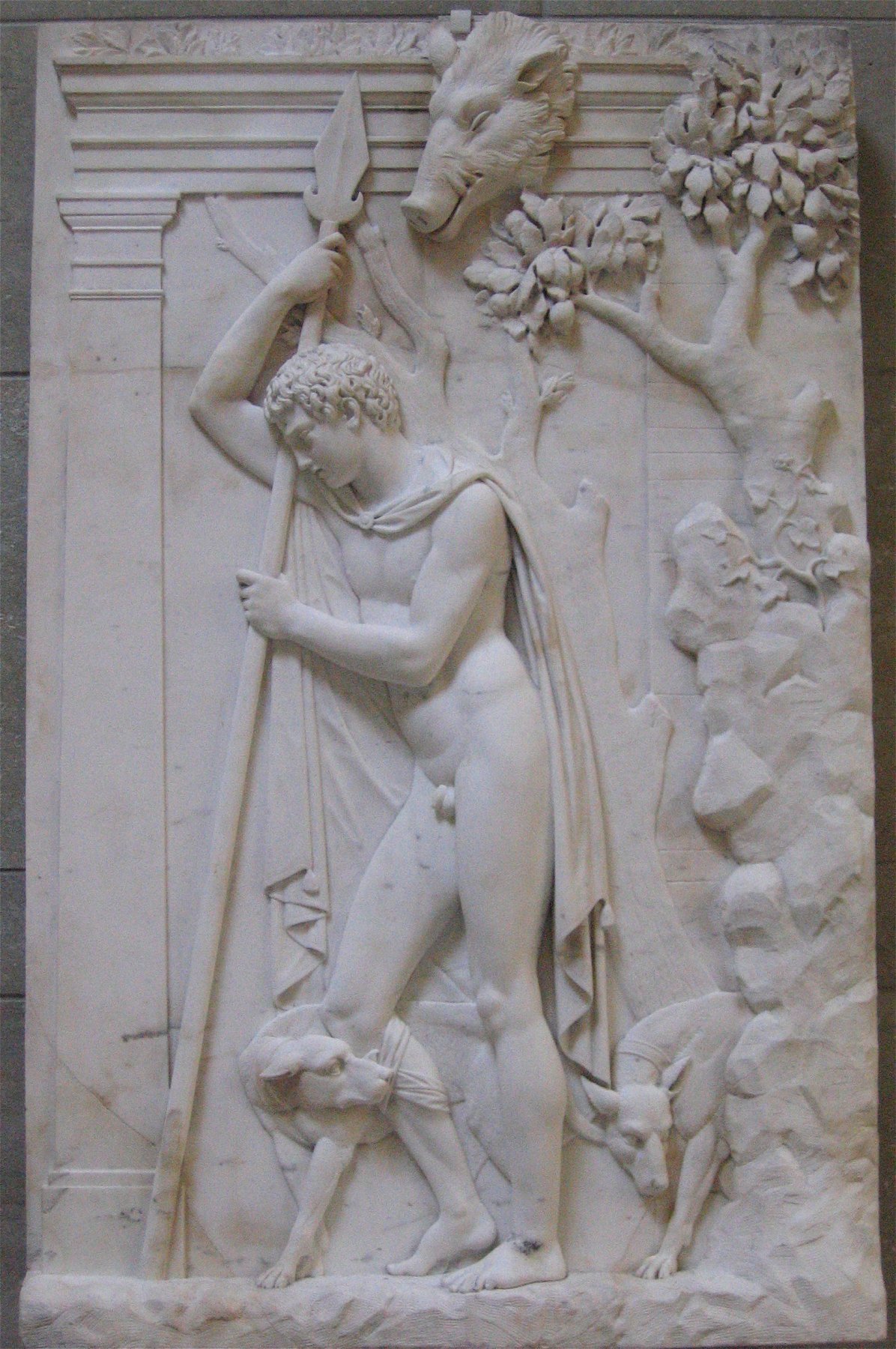 Julius Troschel: Tod des Adonis, um 1840/50, Neue Pinakothek in München